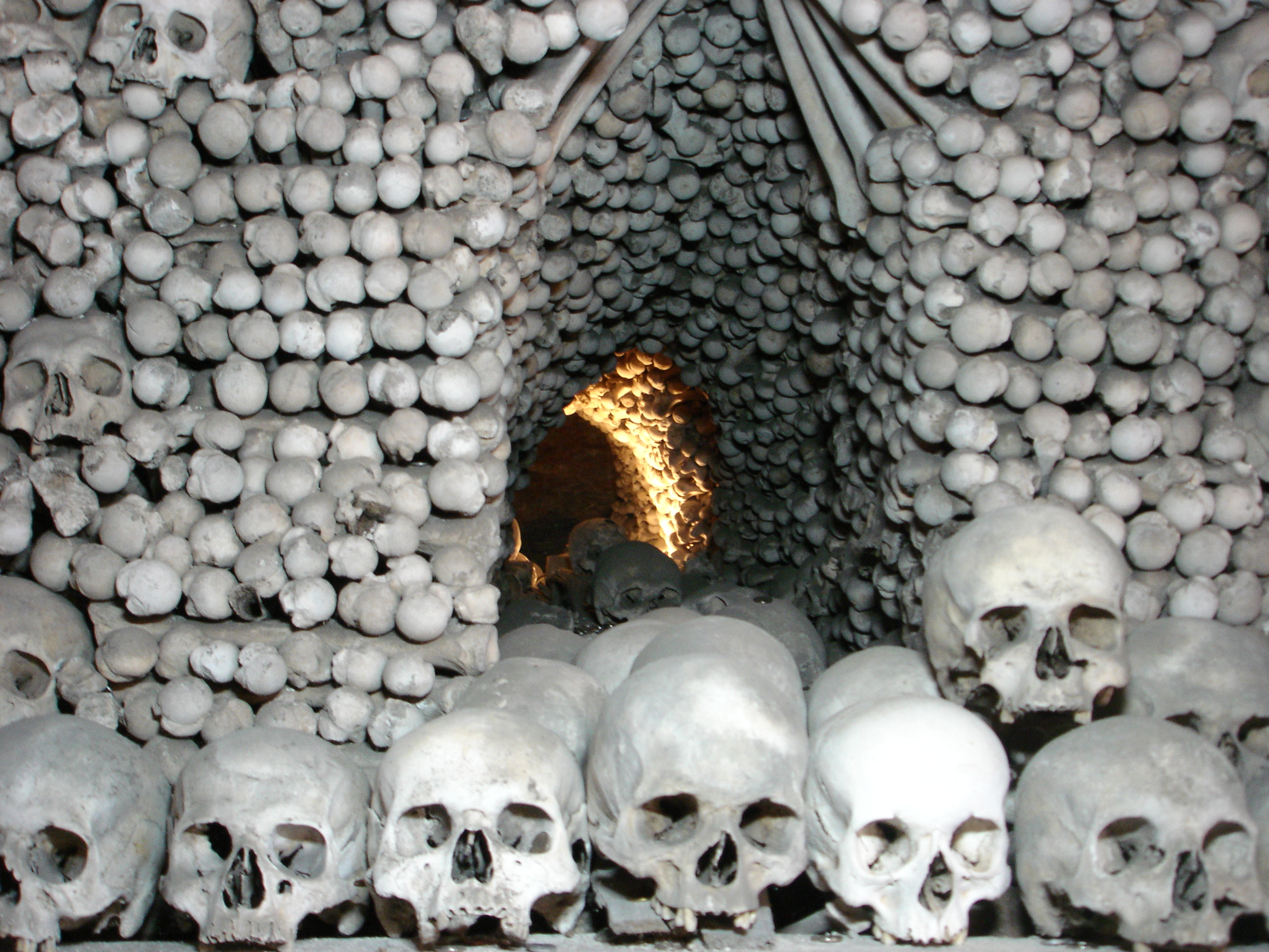 Knochen im Beinhaus von Kutná Hora (Kuttenberg)